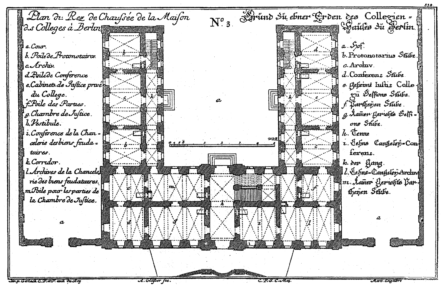 Kollegienhaus Berlin, Grundriss Erdgeschoss Plan du Rez de Chaussée de la Maison des Colleges à Berlin. / Grund zu ebner Erden des Collegien-Hauses zu Berlin.